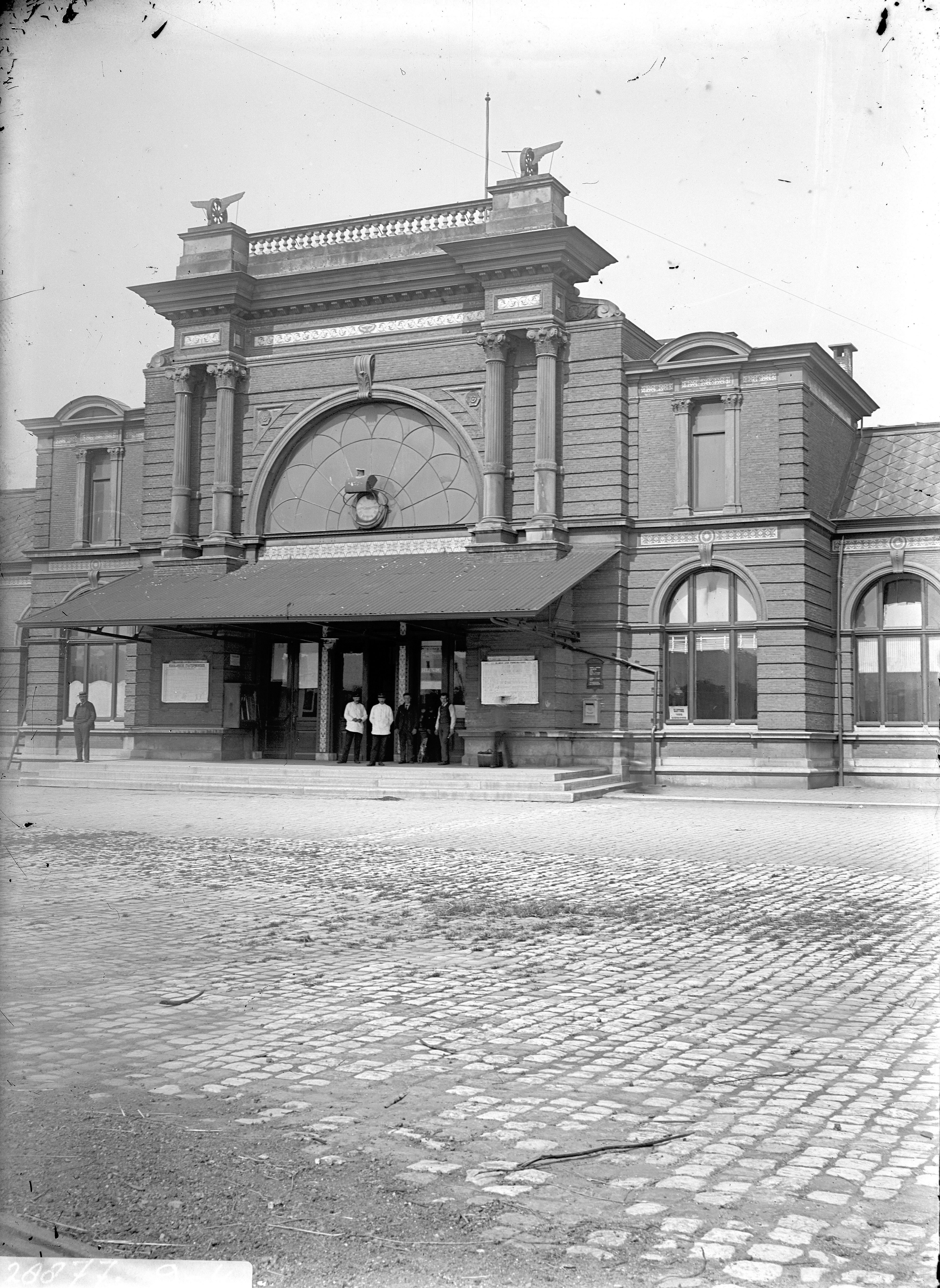 Gezicht op het middengedeelte met ingang gezien vanaf het Stationsplein naar het noordwesten.